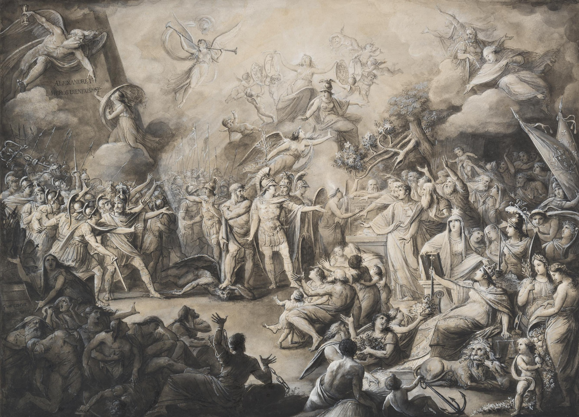 L’Empereur Alexandre Ier accorde à la France de justes formes de gouvernement et de constitution, dessin, 50х68,5 cm.